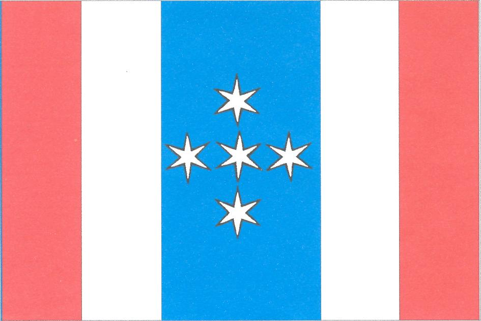 Vlajka obce Borovník